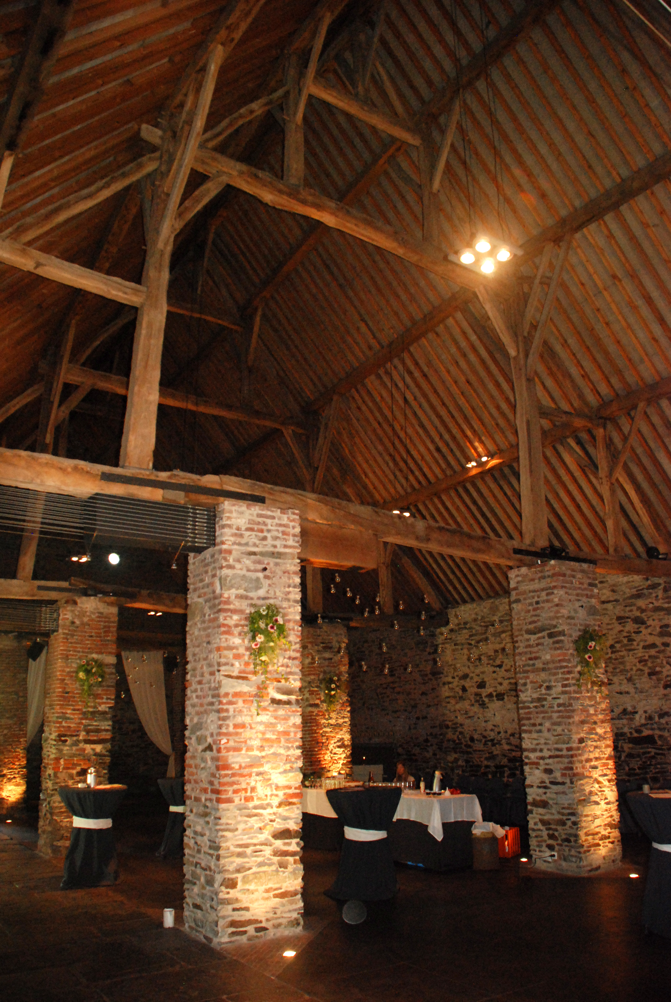 Belgique - Brabant wallon - Court-Saint-Étienne - Ferme de Beaurieux - la grange